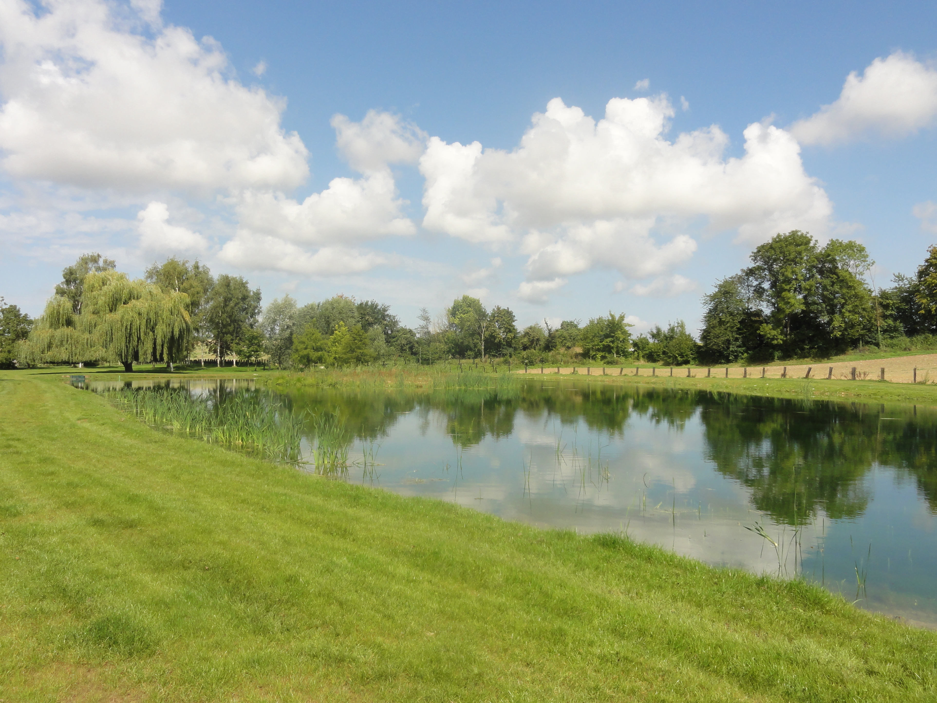 Etang restitué en 2013.